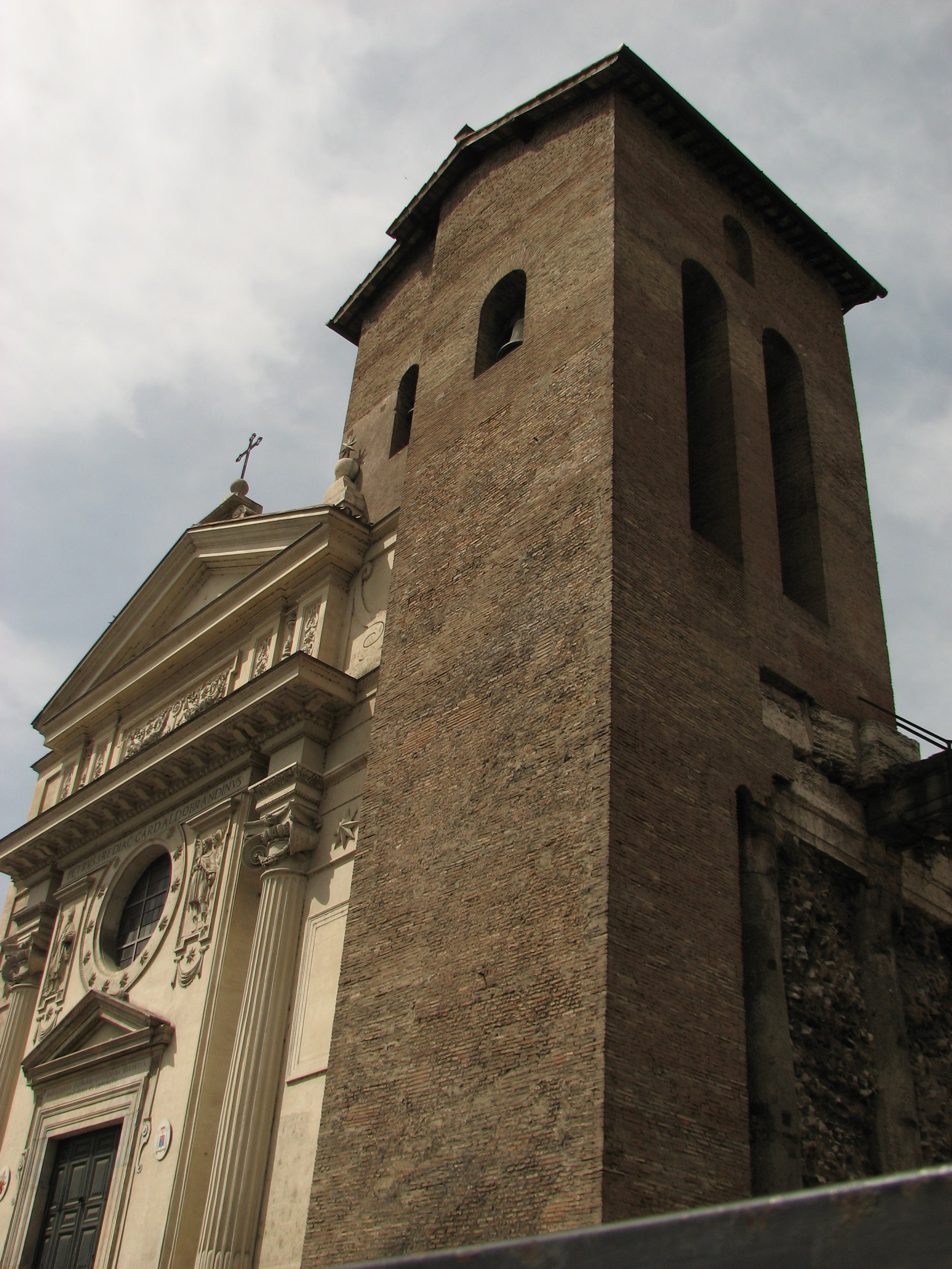 San Nicola in Carcere, Roma, Italia